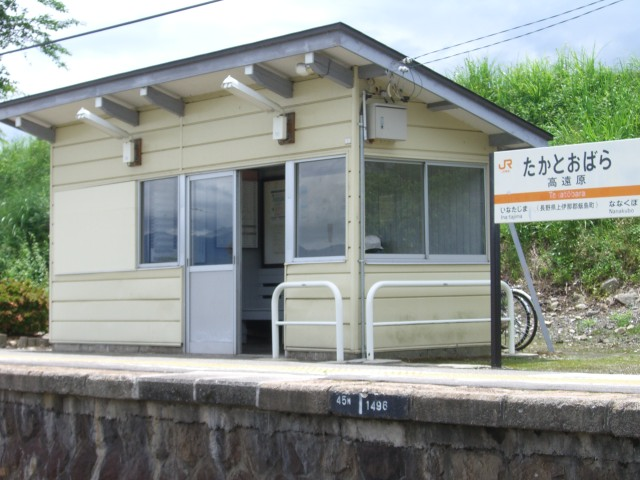 高遠原駅